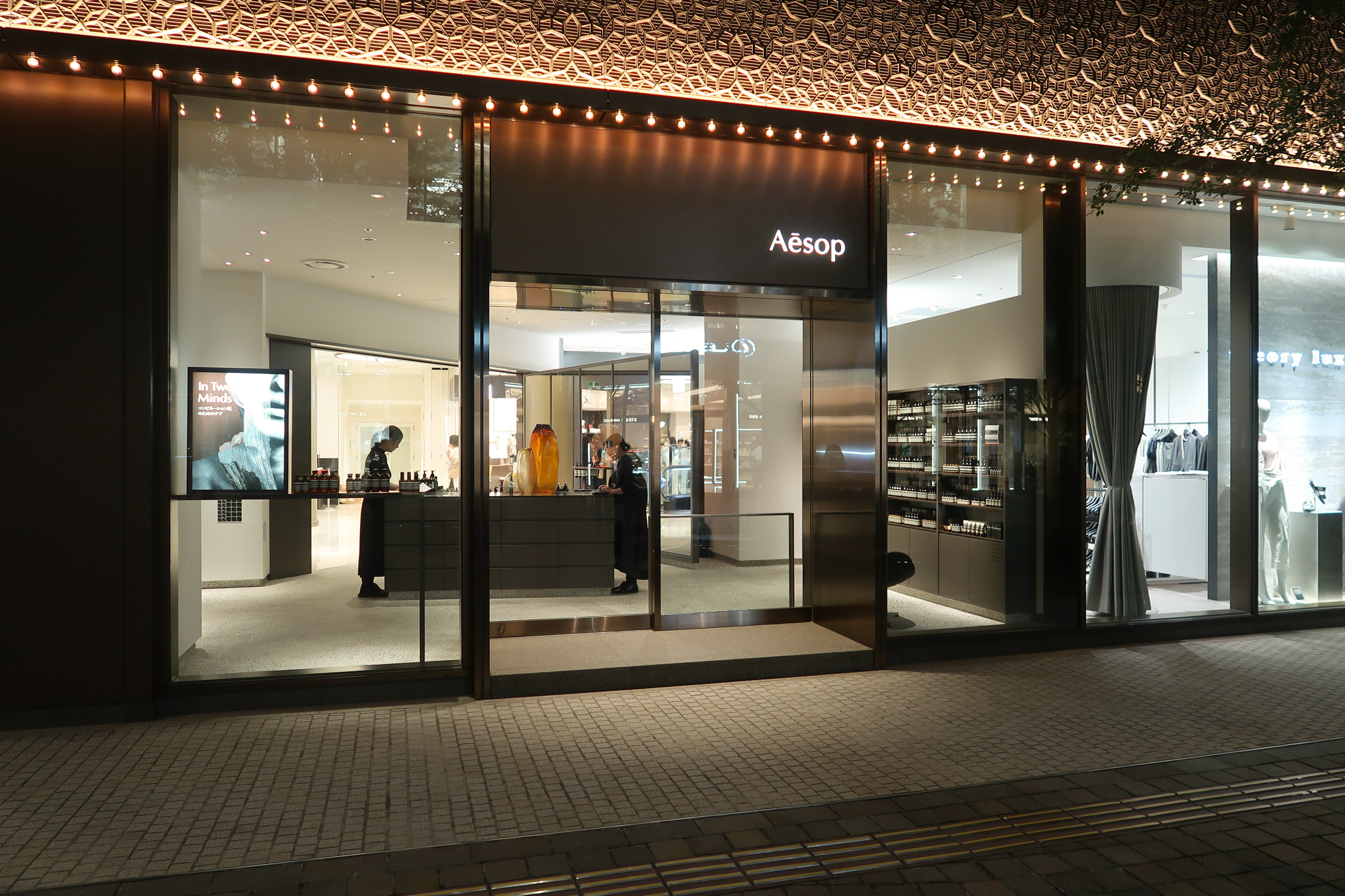 Hibiya Chanter AESOP